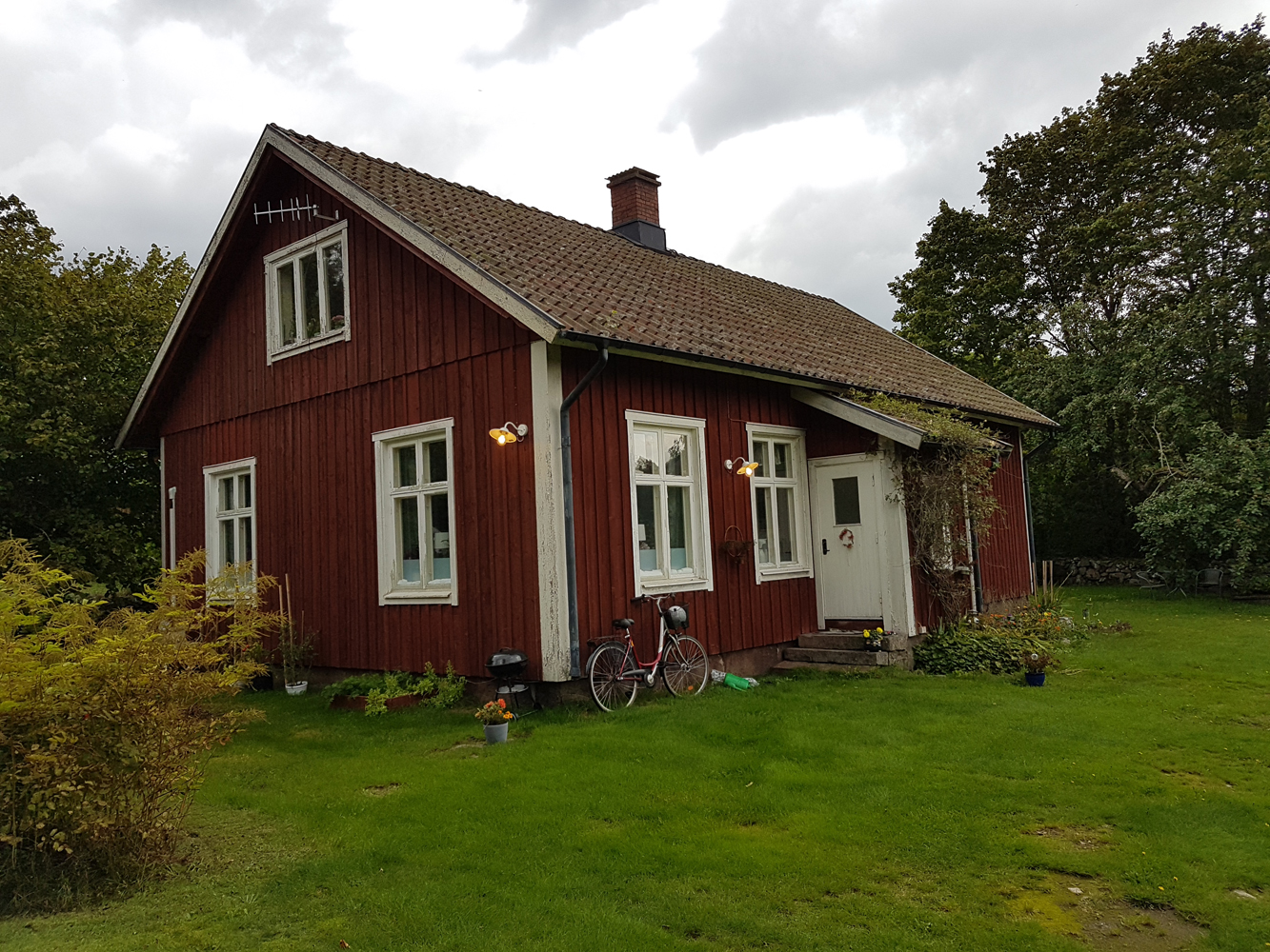 Småskolan i Simlångsdalen sedan 1987 tillhörande Breareds kulturhistoriska förening